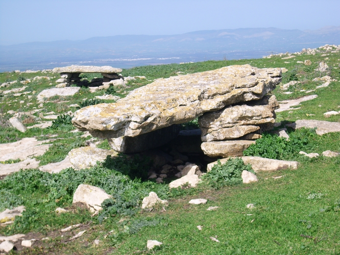 Dolmen du Djebel Gorra. Thibar. Tunisie